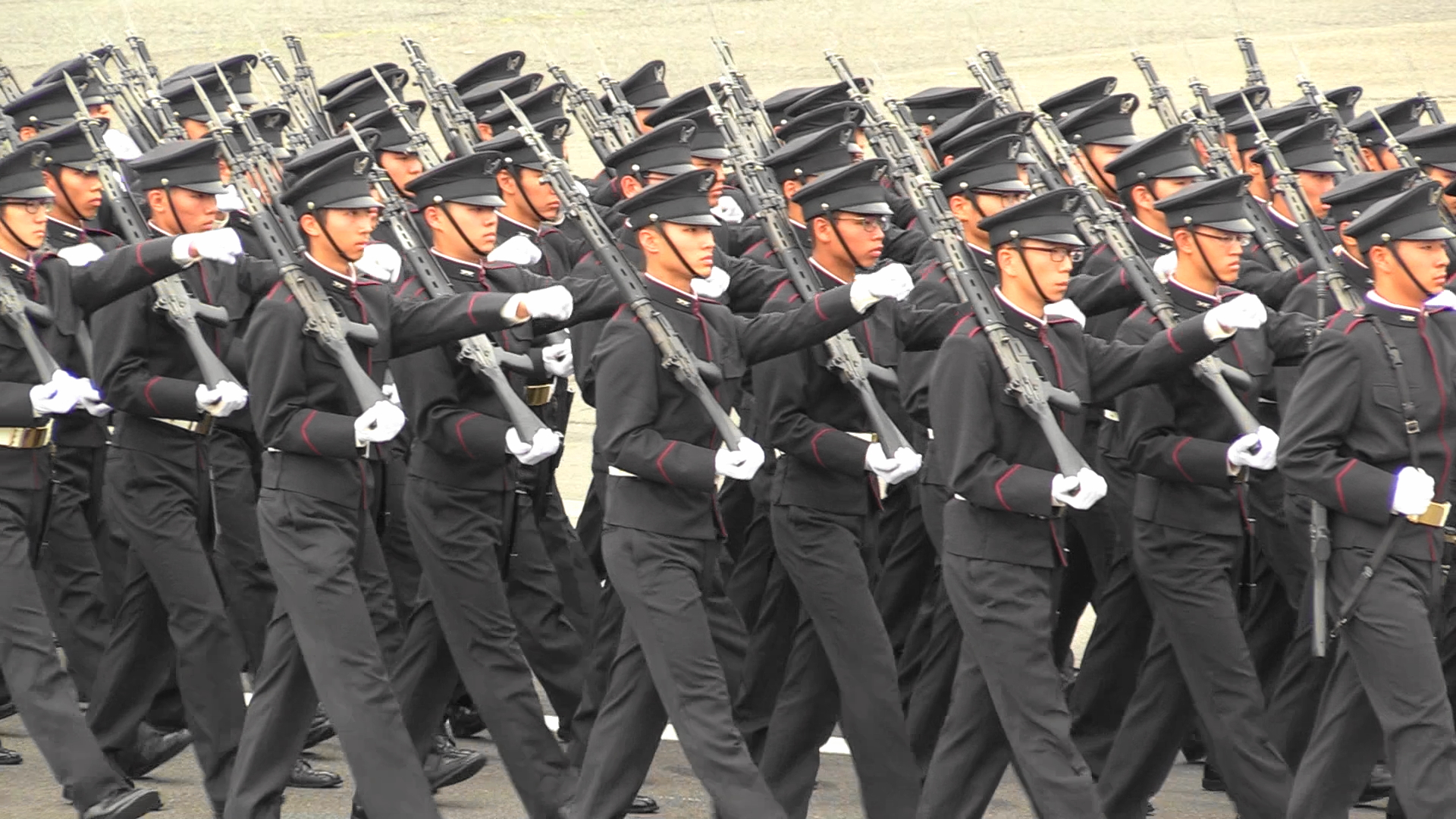 2018年自衛隊記念日観閲式（総合予行）で行進する陸上自衛隊高等工科学校生徒。